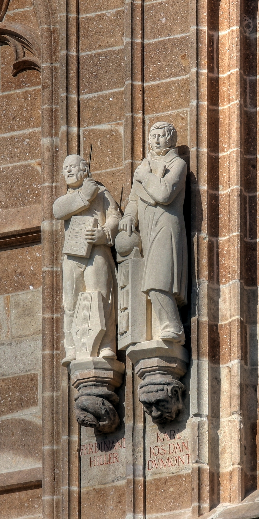 Rathausturm Köln mit den Figuren des Ferdinand Hiller und Karl Joseph Daniel DuMont Details zu der Statue: Bildhauer der Hiller-Statue: Theo Heiermann Bildhauer der DuMont-Statue: Theo Heiermann Details zu der Konsole: Thema der Konsole unter der Hiller-Statue: „Fabelwesen“ Thema der Konsole unter der DuMont-Statue: „Grinkopf“